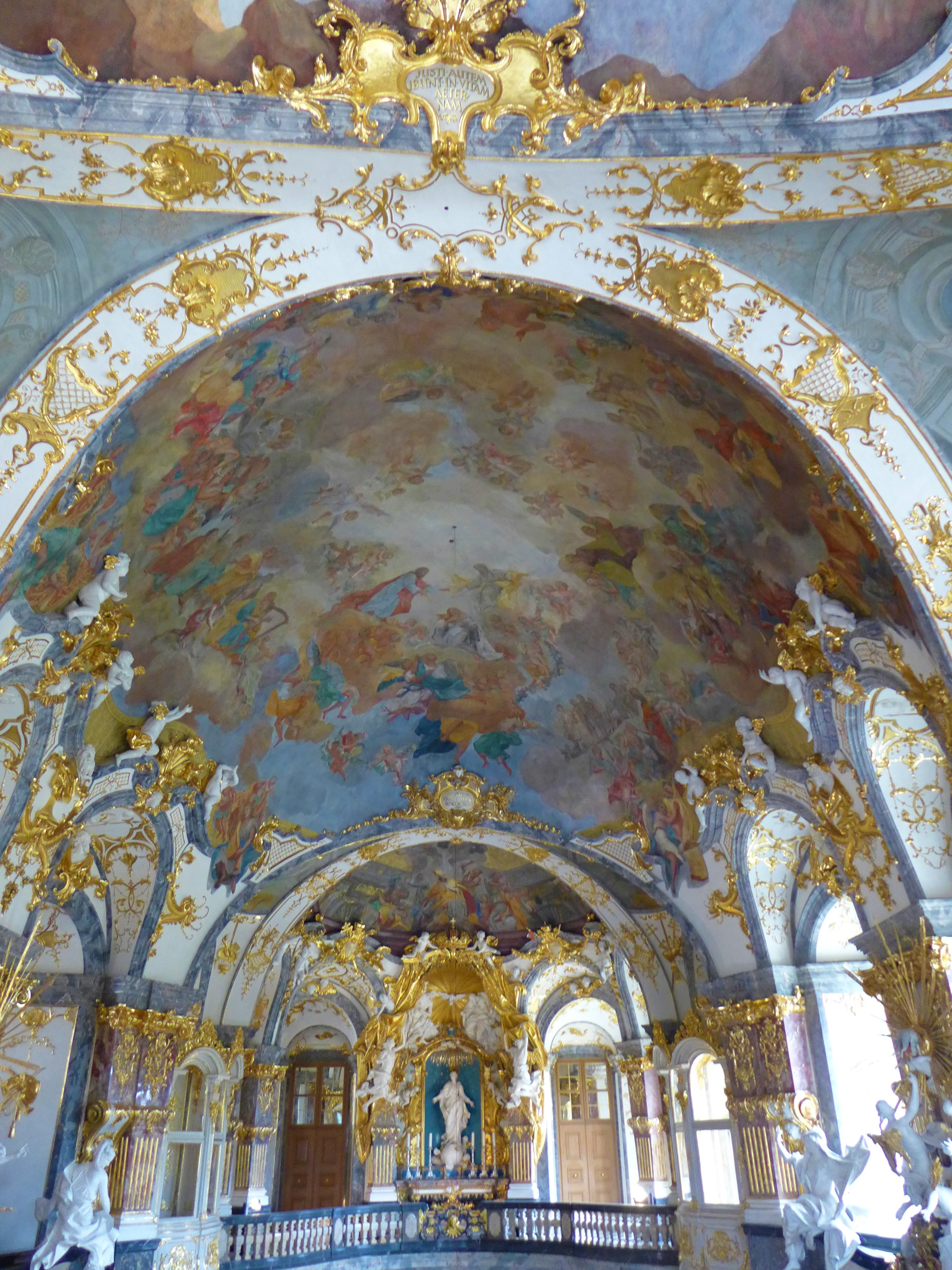 Deckengemälde der Hofkirche in Würzburg, Marienkrönung